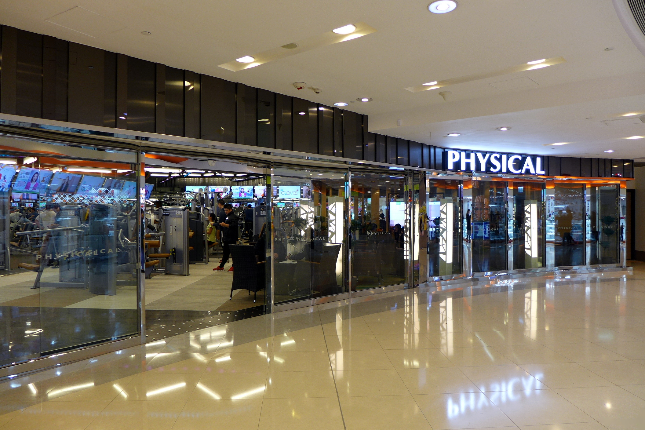 Lok Fu Plaza Physical